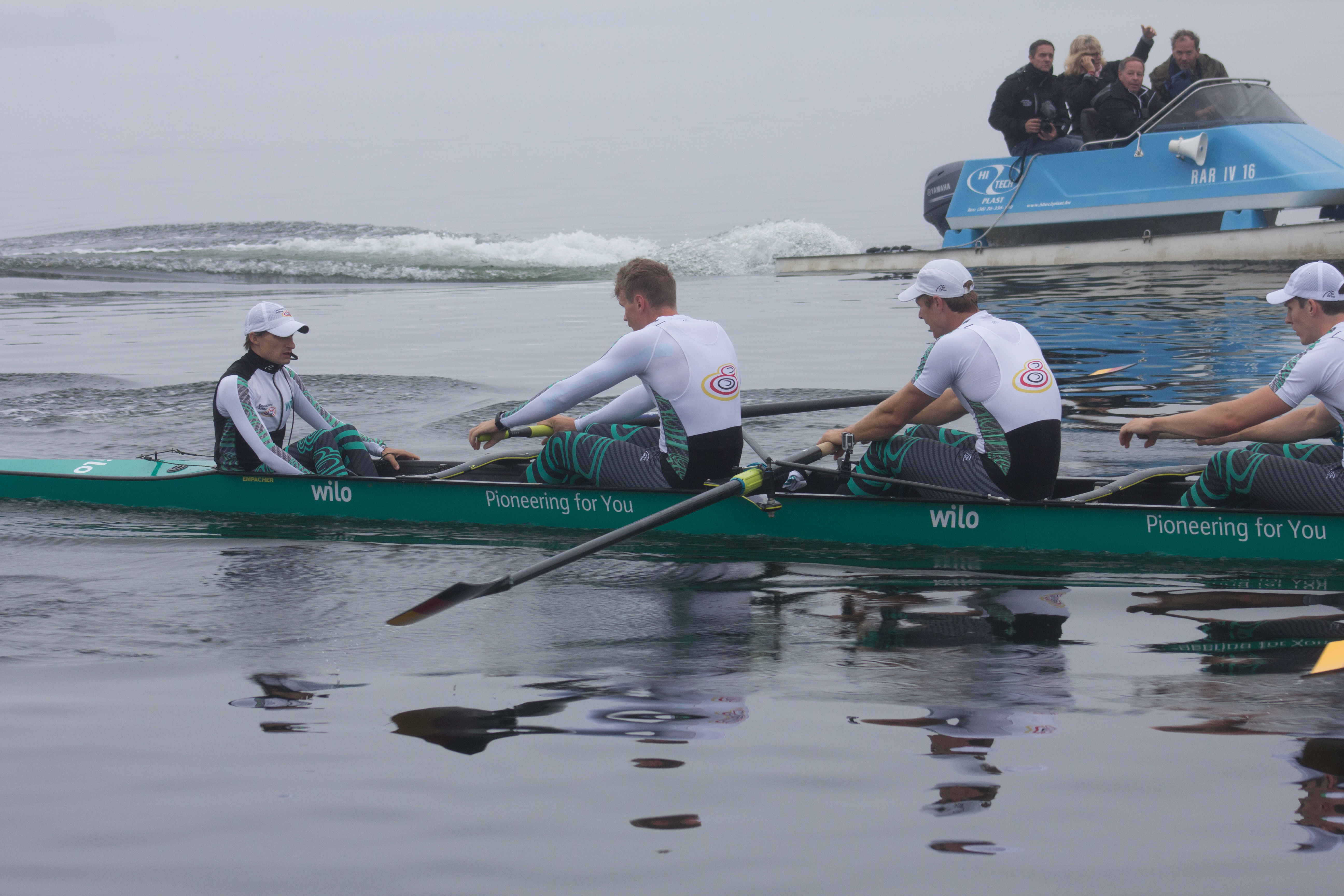 Medientag des Ruderverbandes in der Ruderakademie Ratzeburg am 6. September 2017: Deutschland-Achter im Training auf dem Ratzeburger See in der Besetzung: Johannes Weißenfeld, Felix Wimberger, Maximilian Planer, Torben Johannesen, Jakob Schneider, Malte Jakschik, Richard Schmidt, Hannes Ocik, Martin Sauer